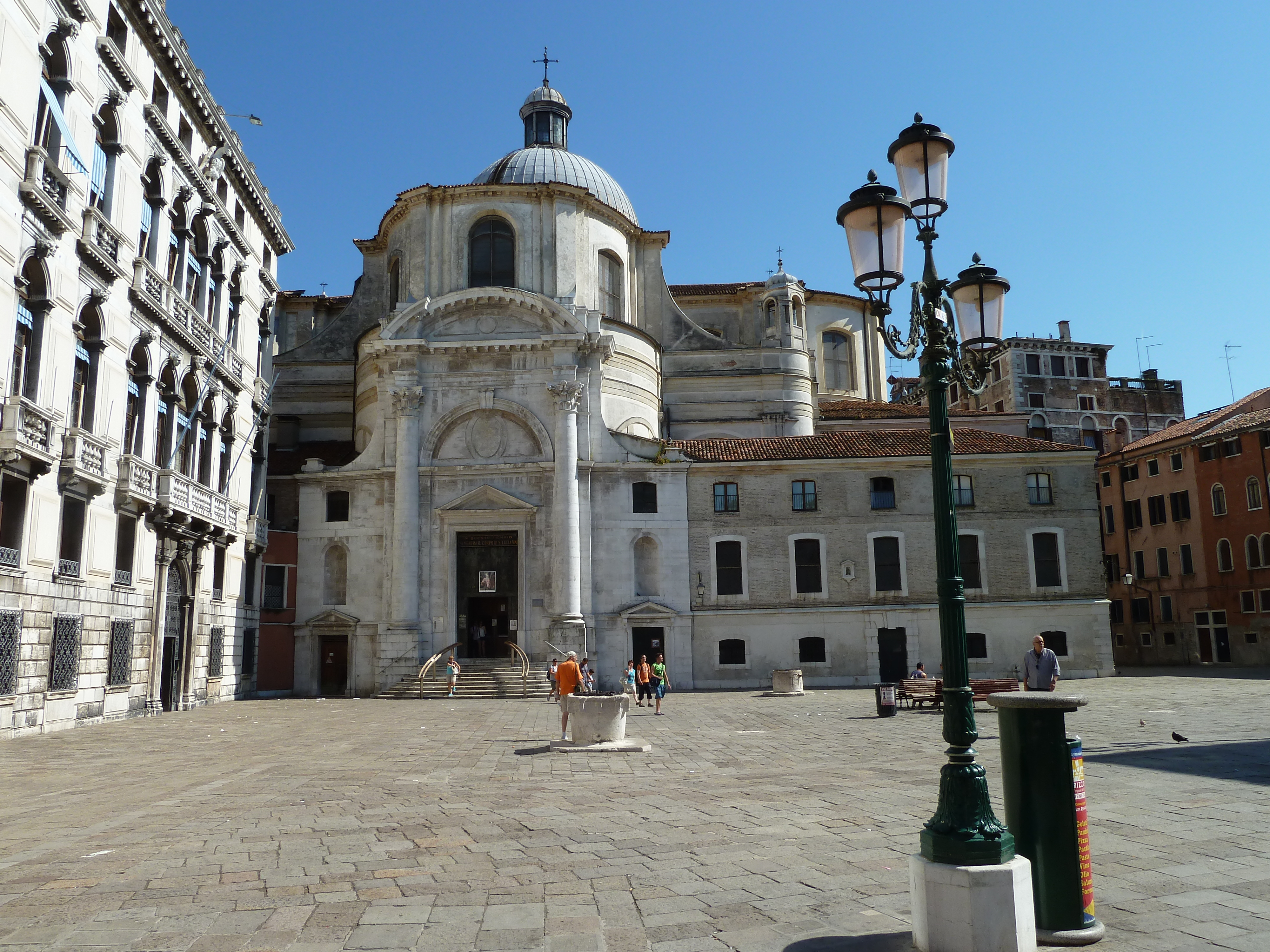 S geremia